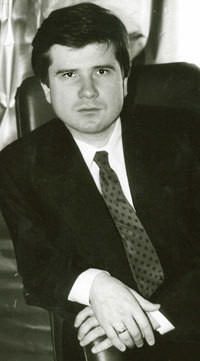 Портрет Михаила Степановича Петухова